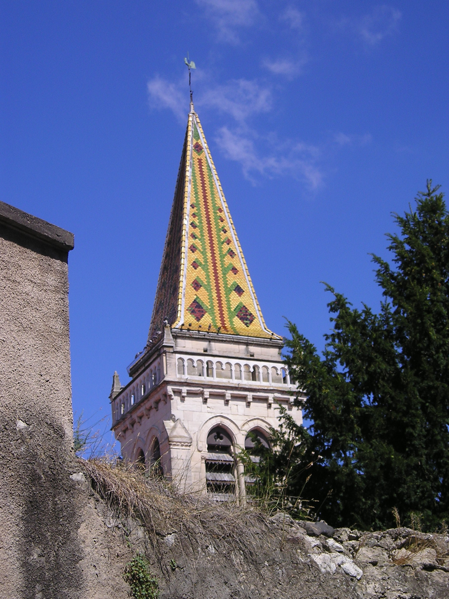 Kirchturm von Saint-Mary in Orcet